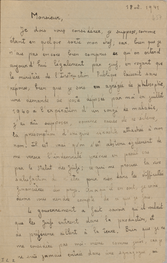 Première page de la lettre de remerciements ironiques adressée à Xavier Vallat, commissaire général aux questions juives sous le régime de Vichy.